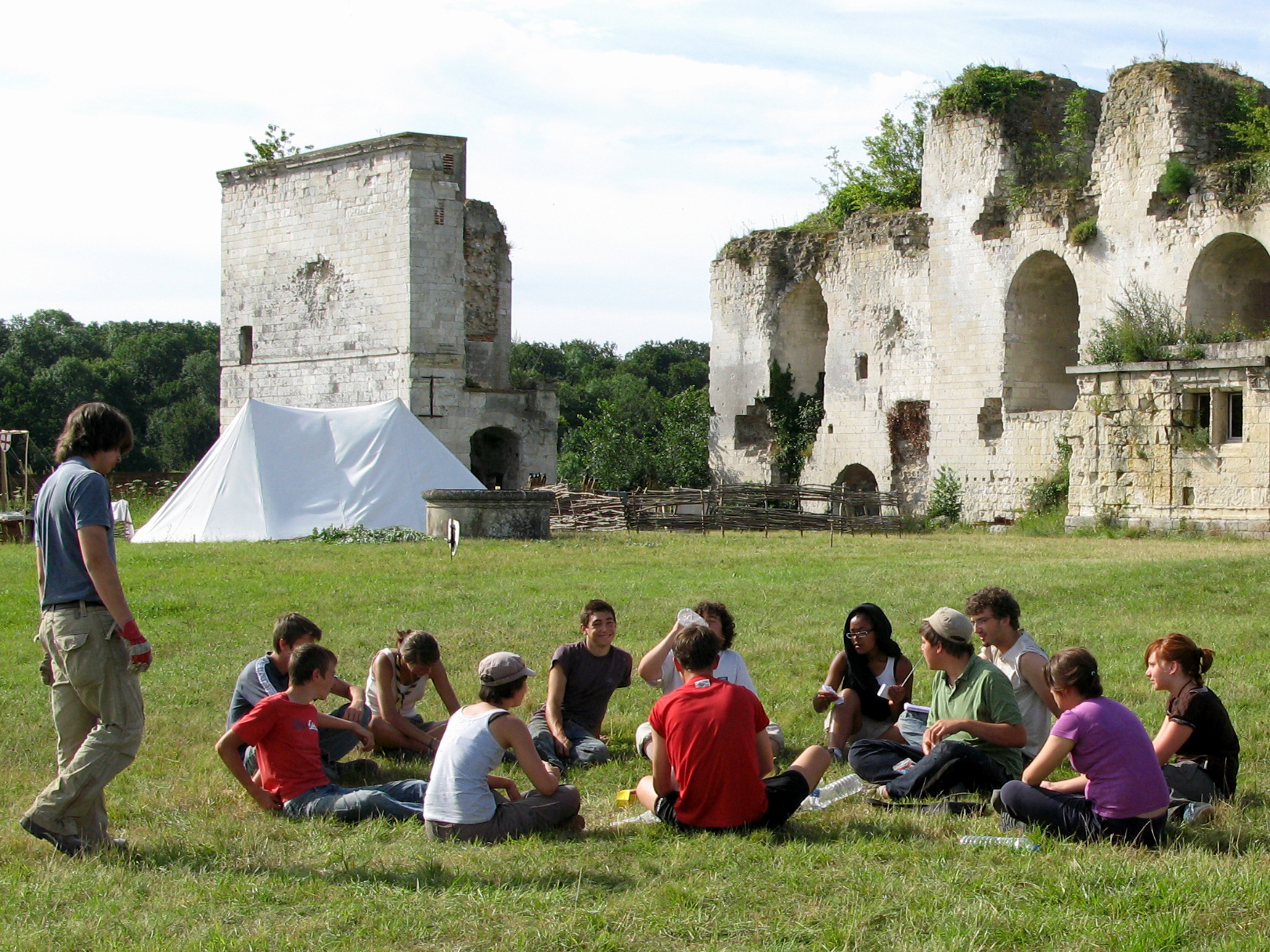 Picquigny (Somme, France) - Dernier jour de travail de jeunes bénévoles au château. Cour intérieure du château (photo prise en direction du Sud-Est) avec en arrière-plan les vestiges au sommet desquels poussent des arbustes. La tente blanche (dressée à gauche entre le puits et le pan de mur subsistant du logis seigneurial) n'est pas utilisée par ce groupe. C'est celle de l'association « Les Chevaliers du Roc Blanc » qui propose pour quelques jours, aux visiteurs, des animations relatives aux Templiers. Les jeunes bénévoles commencent tout juste leur pause matinale sur la pelouse de la cour intérieure (plus confortable que le terrain de l'ancienne place d'armes sur lequel ils utilisent pioches, fourches et râteaux).